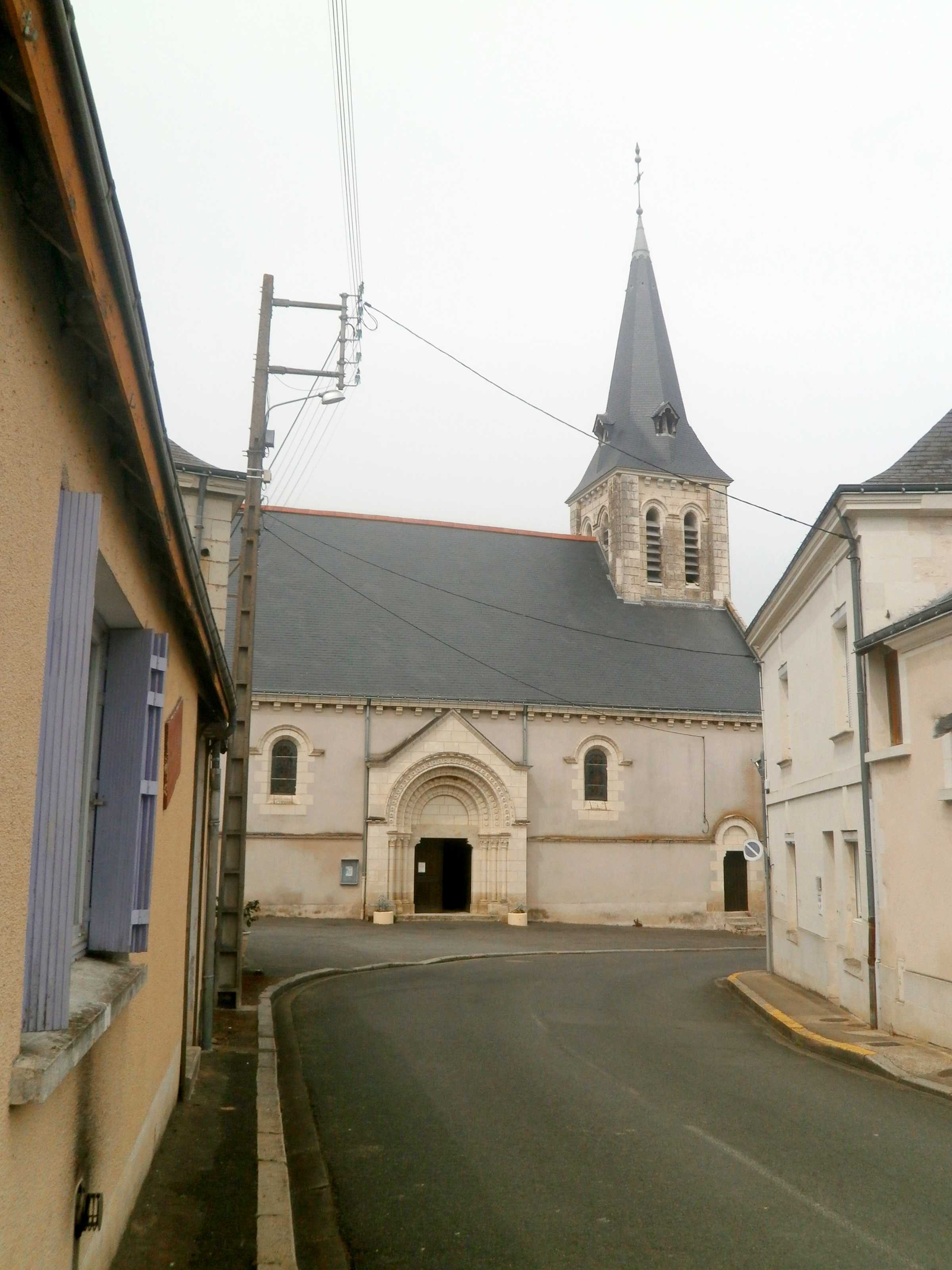 L'église de Rivarennes